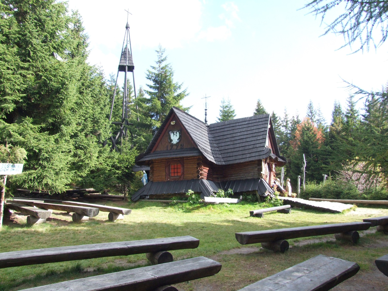 Kaplica Papieska na Polanie Rusnakowej w Gorcach